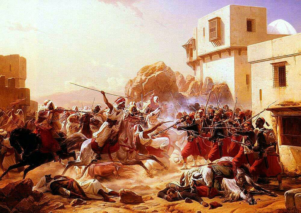 Algérie - Peintre Danois Niels Simonsen (1807-1885), huile sur toile , Titre: Le dernier combat ( Bataille de LAGHOUAT 1852 )